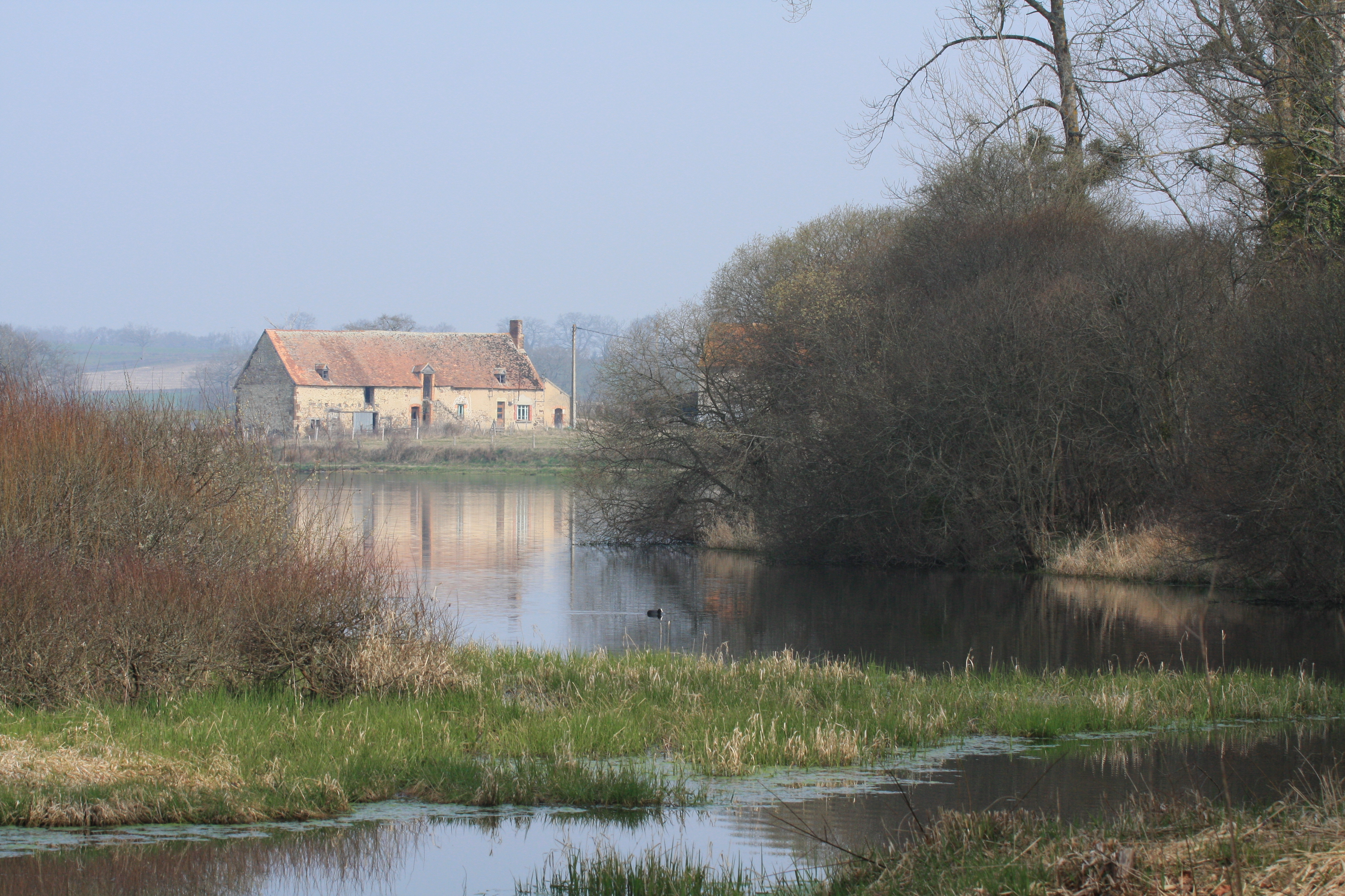 Etang des landes dans le département de la Creuse, France